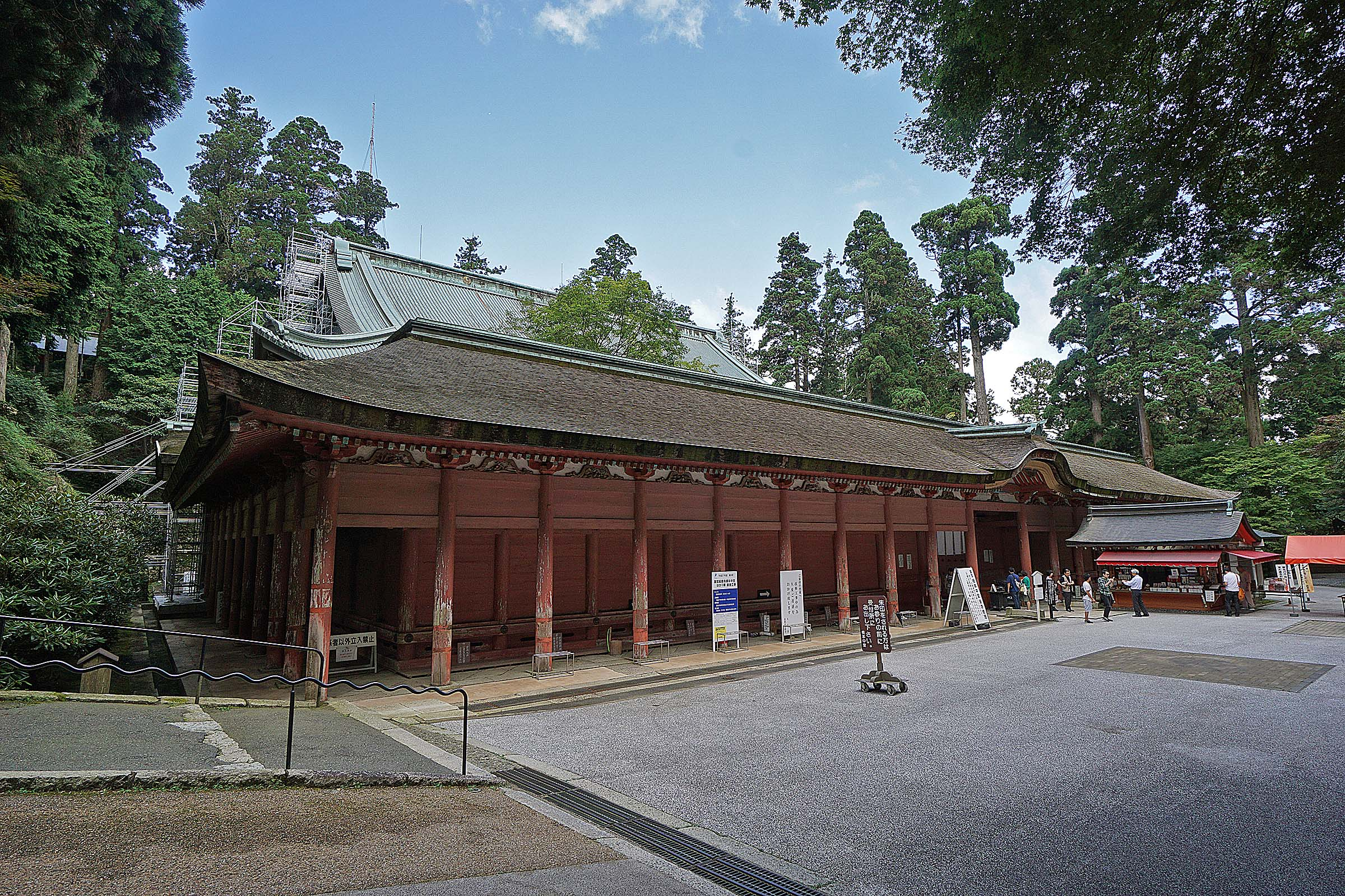 Mt Hiei Enryakuji temple , 比叡山 延暦寺